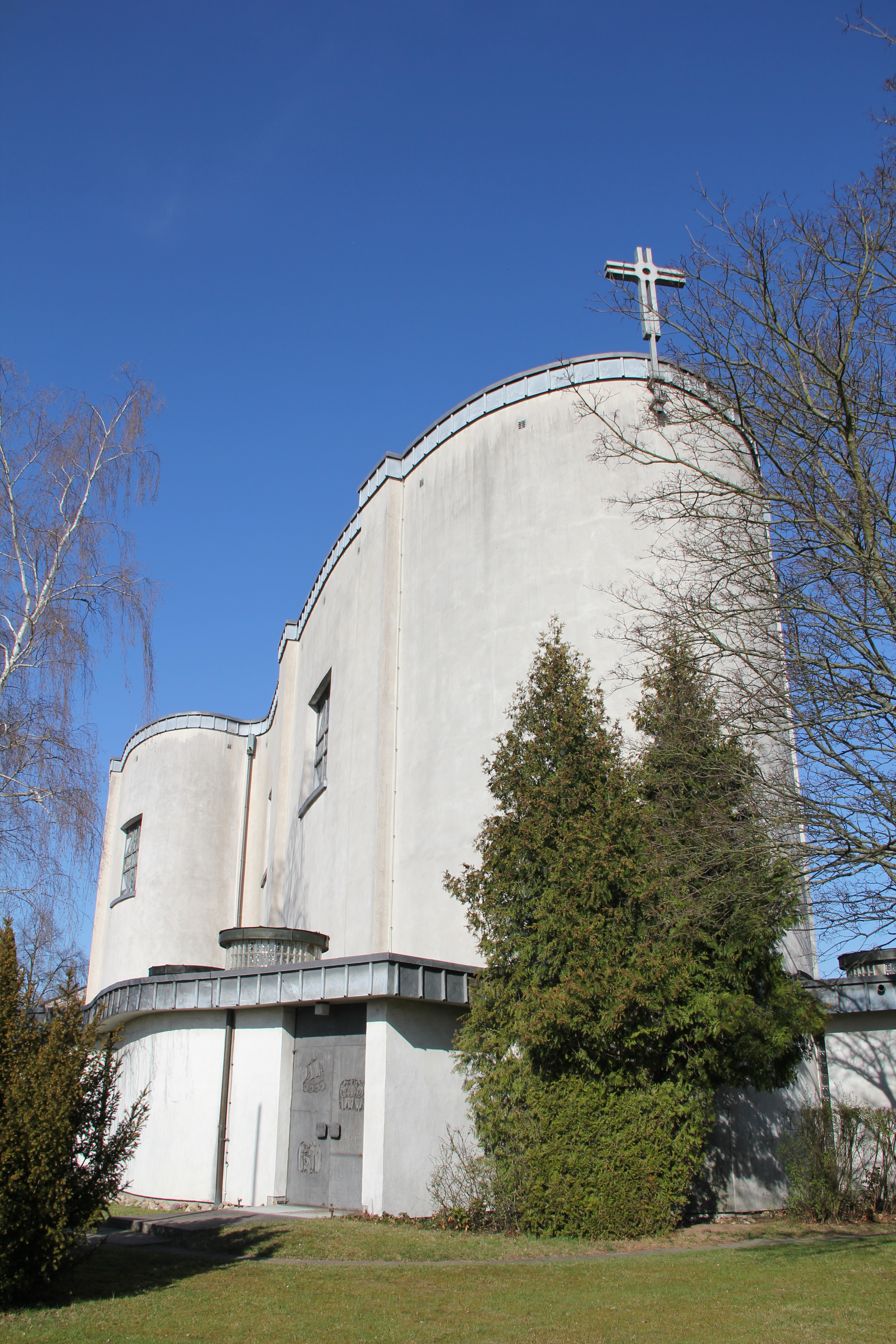 Kath. St. Bonifatiuskirche in Wetzlar